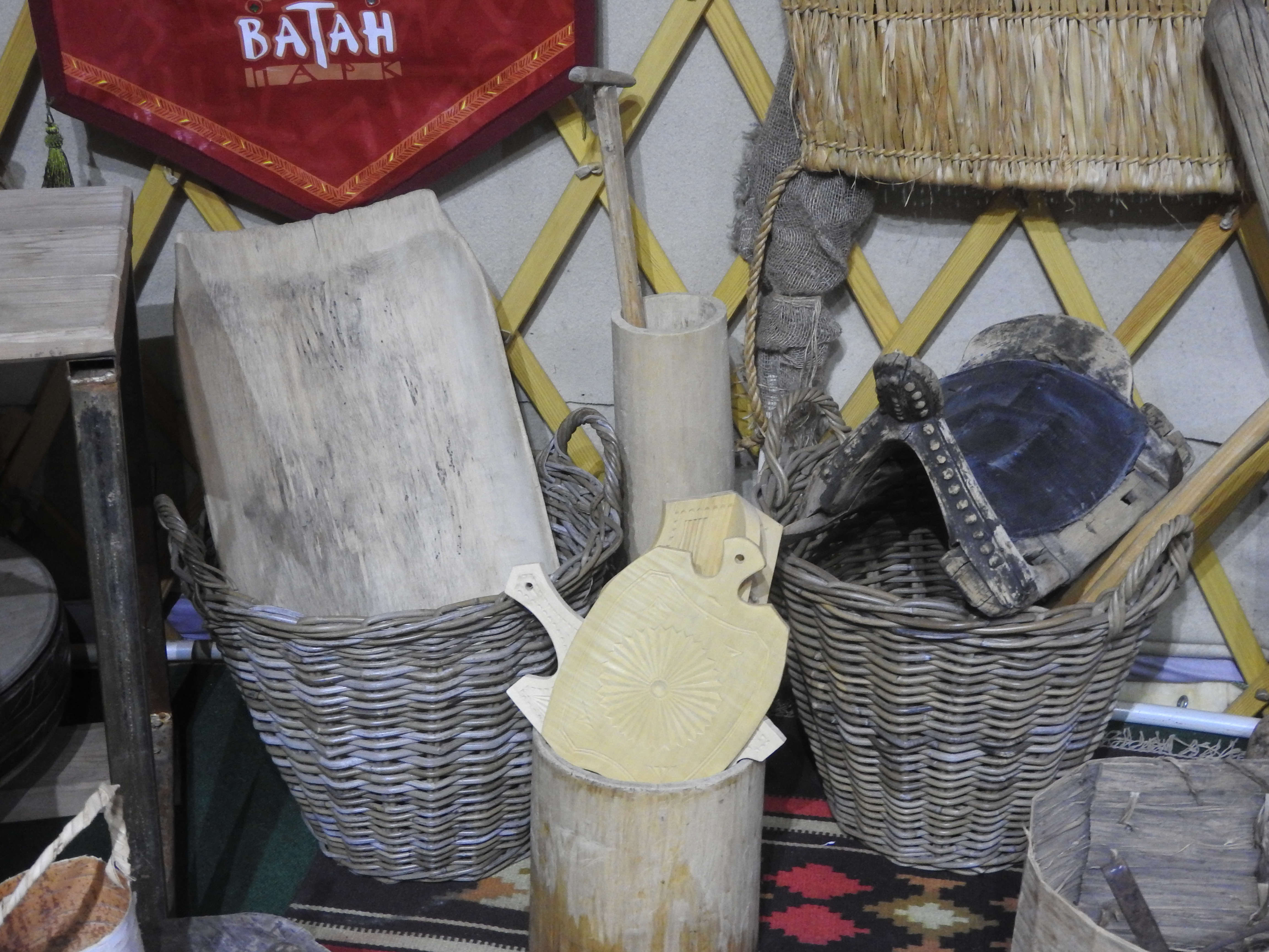 Башҡортса: Кәрзиндәр, он иләй торған һелкеүес, ағас һауыт тәпән, ағас ҡайырынан эшләнгән тубал, батман, эйәр.